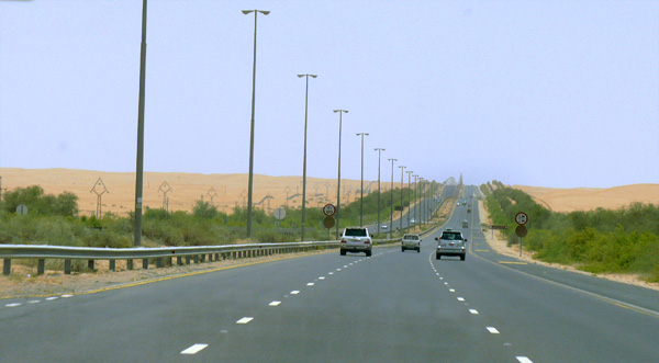 Dubai Al Ain Road